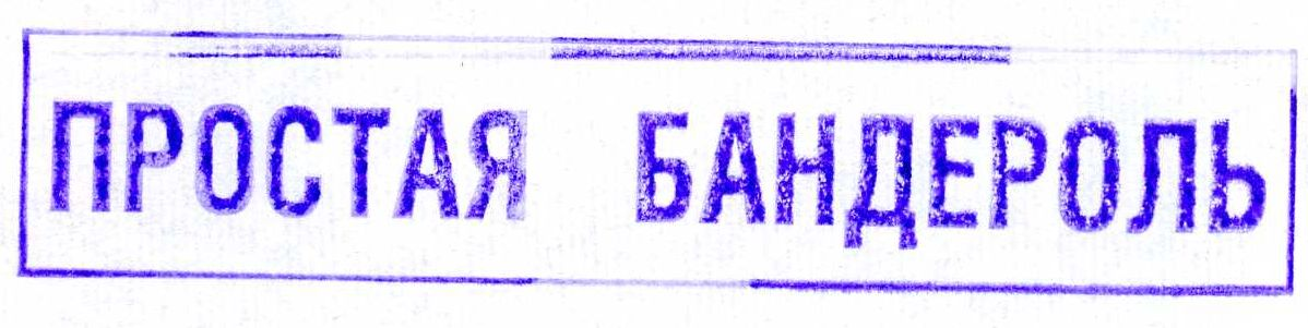 Пример штампа франкировальной машины системы